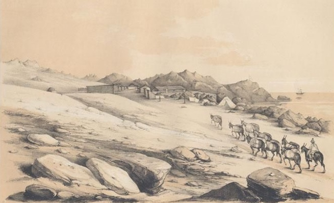 Rodolfo Amando Philippi 1860 En el libro Viage al Desierto de Atacama. hecho de orden del gobierno de Chile en el verano 1853-54